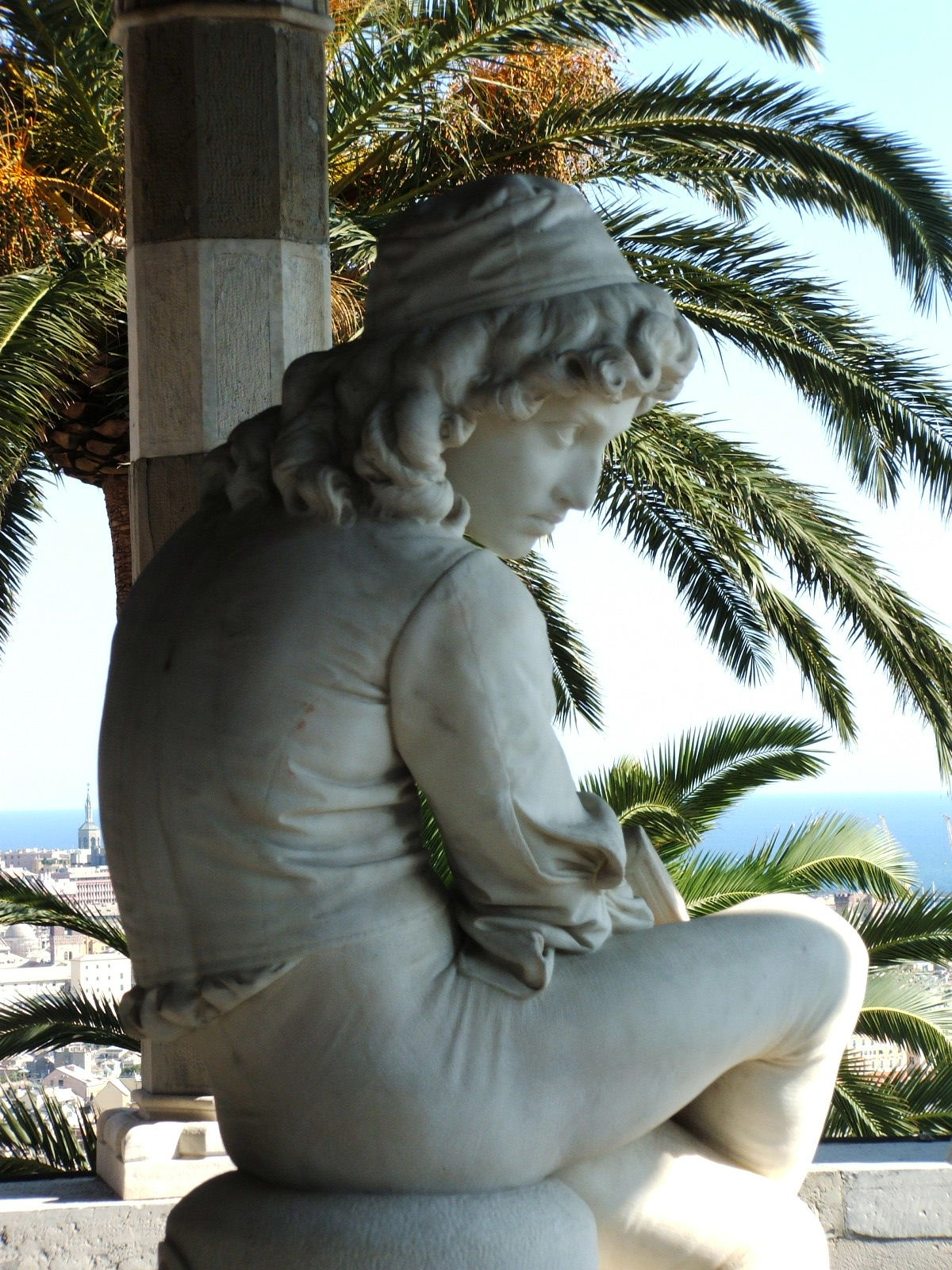 Immagine dalla città di Genova